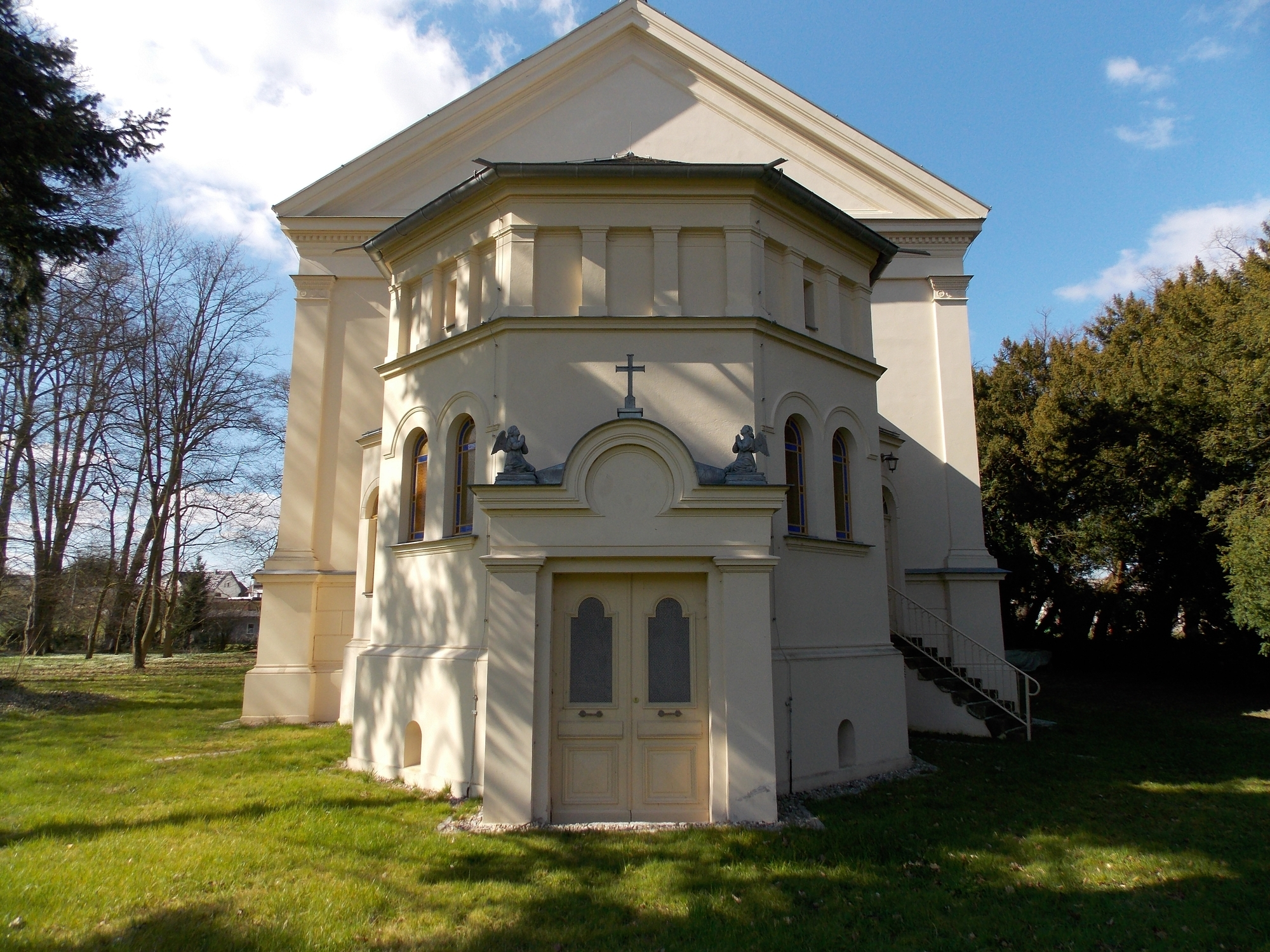 klassizistische Gutskapelle, Gut Melkof, Grabkapelle Familie von der Decken